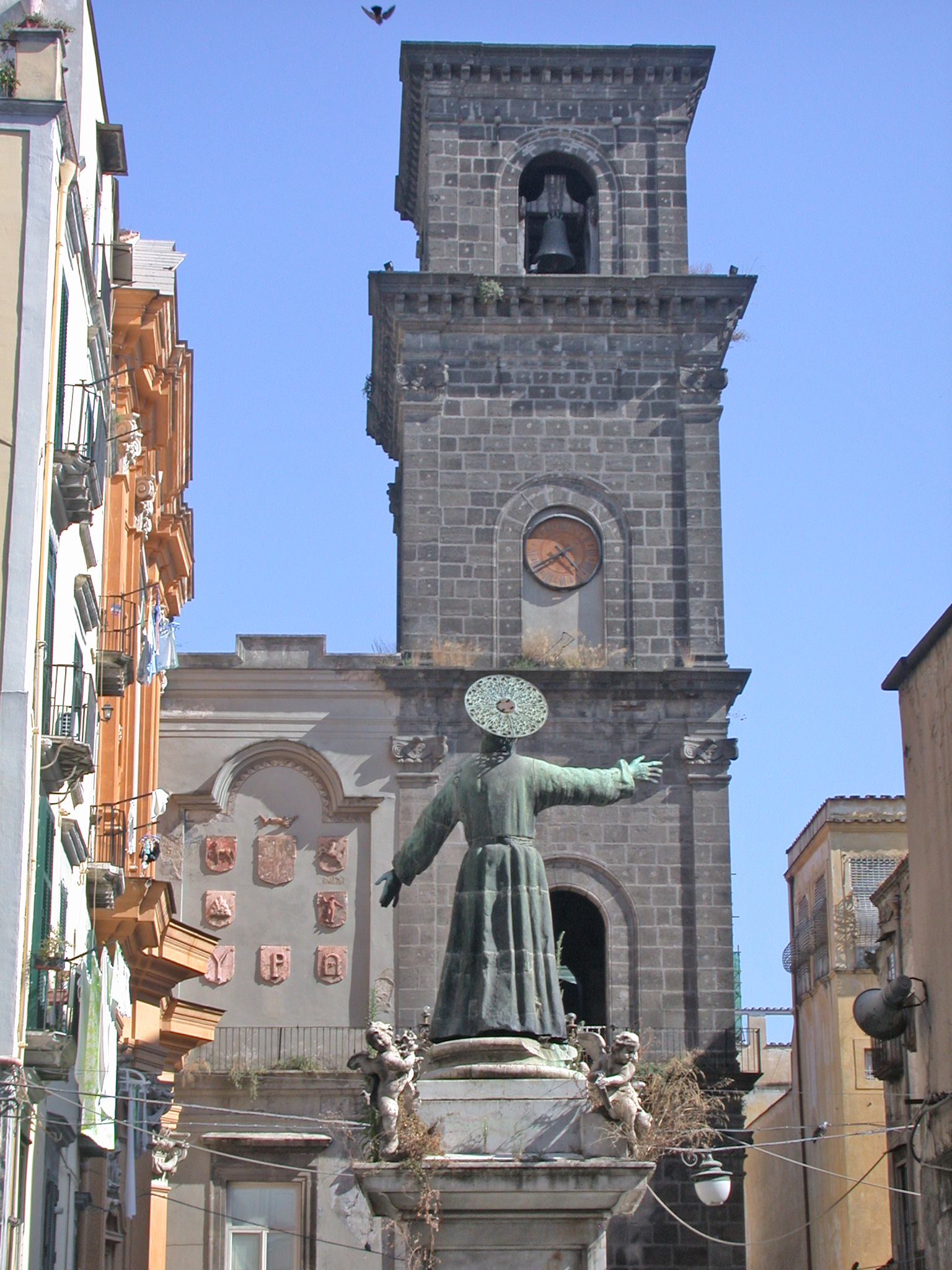 Italia, regione Campania, Napoli, chiesa di San Lorenzo Maggiore, campanile.